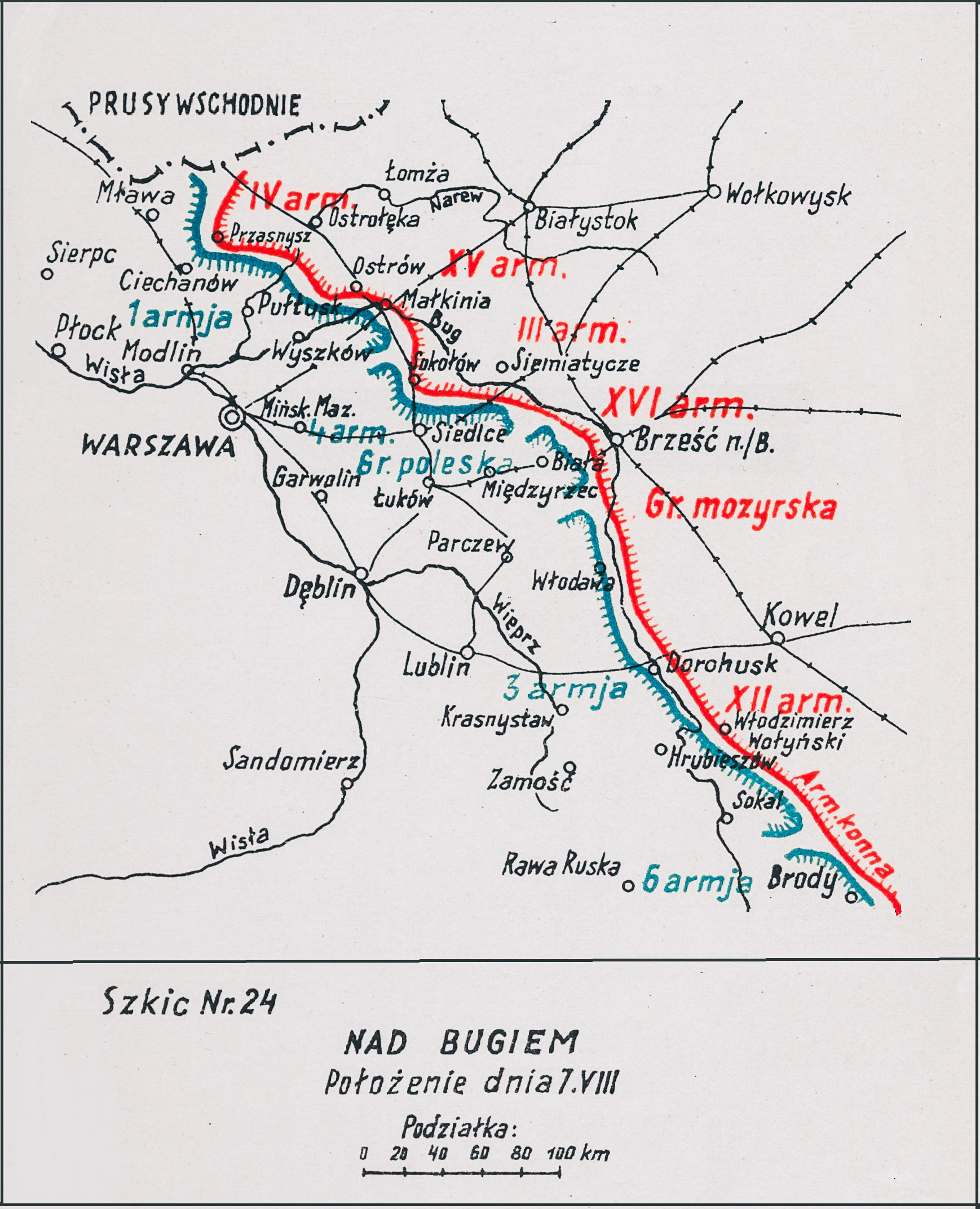 Nad Bugiem. Położenie jednostek polskich i rosyjskich dnia 7 sierpnia 1920. Adam Przybylski, Wojna Polska 1918 ― 1921; Szkic Nr 24.